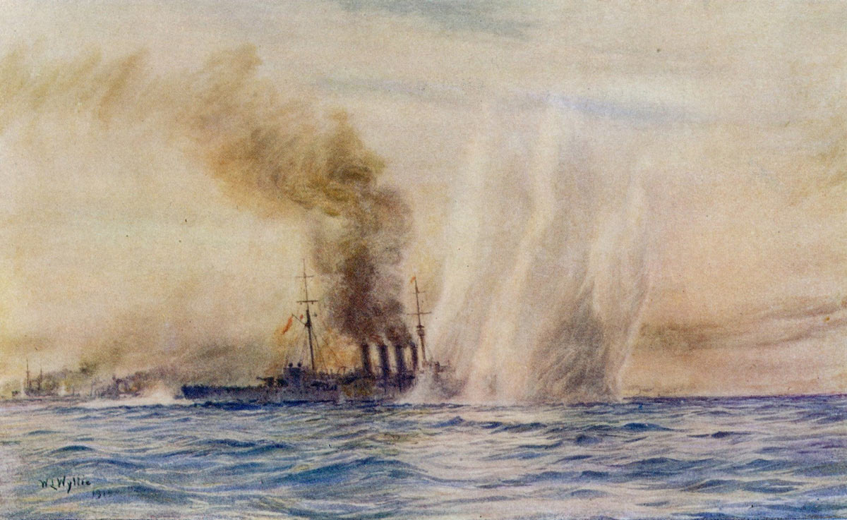 Le croiseur léger britannique HMS Southampton lors de la bataille du Jutland, le 31 mai 1916. Le navire est gravement endommagé au cours de l'affrontement.